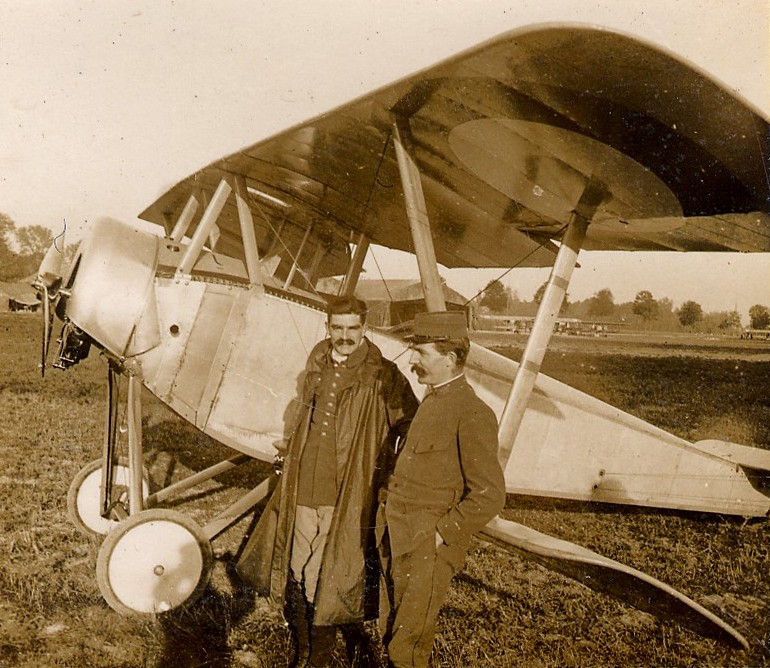 Le docteur Colombe et son frère posent devant un avion biplan Nieuport de l'escadrille 23 à Somme-Vesle (Marne). 1916. Guerre 1914-1918.